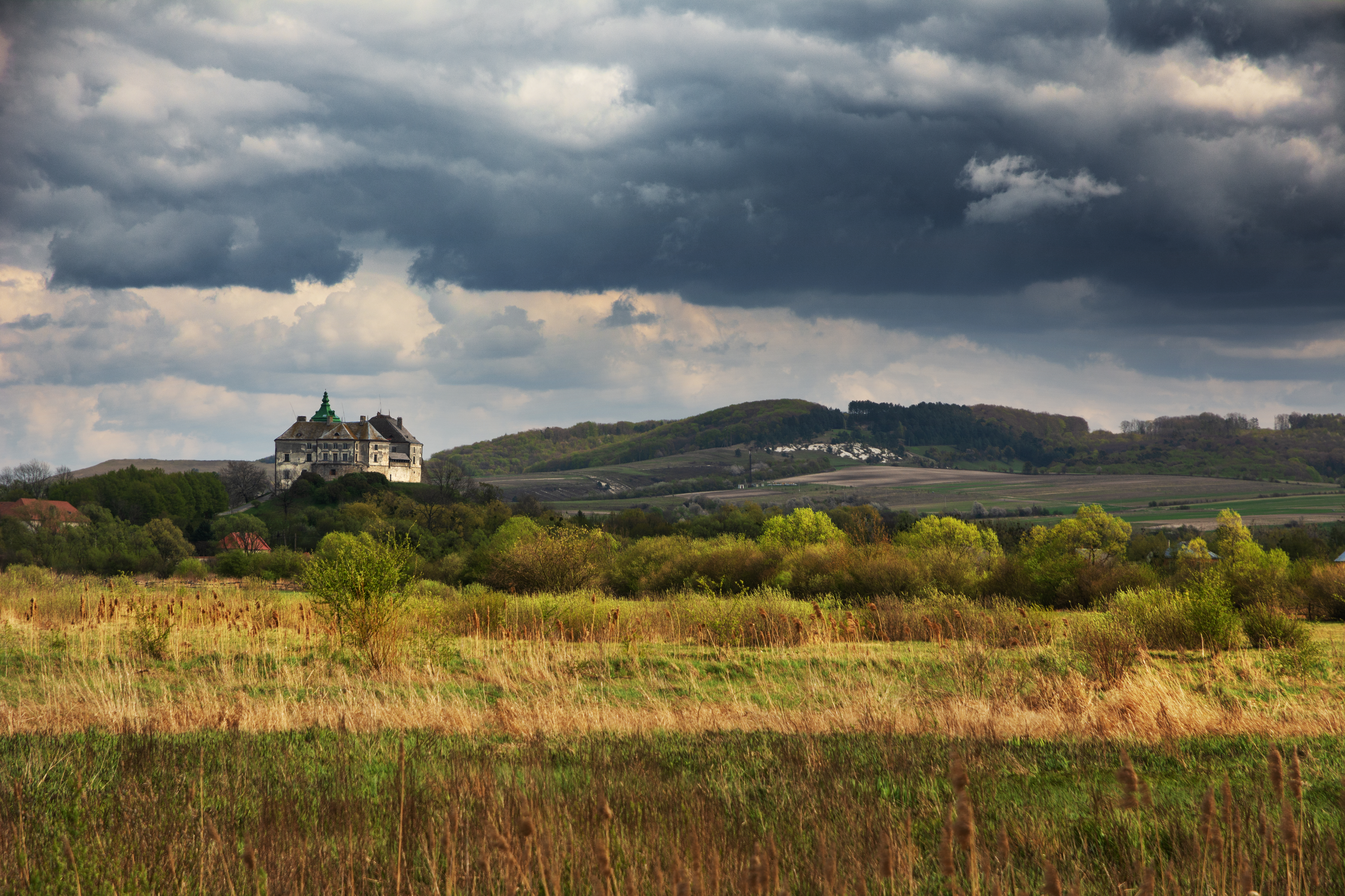 Замок Даниловичів, Олесько